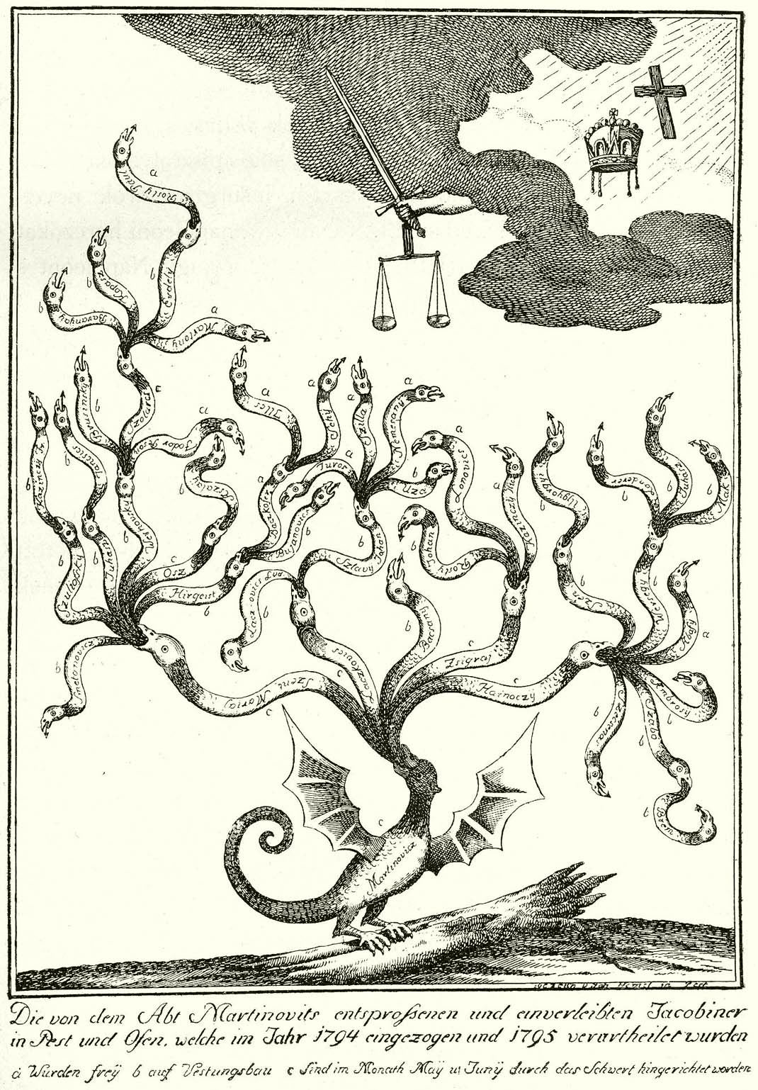 A Martinovics-féle összeesküvés egykorú gúnyképe. 1795-ből. Wahrhafftige Beschreibung wie es mit denen Criminal-Processen wider die ungarischen Jakobiner eigentlich hergangen. Wien, 1795